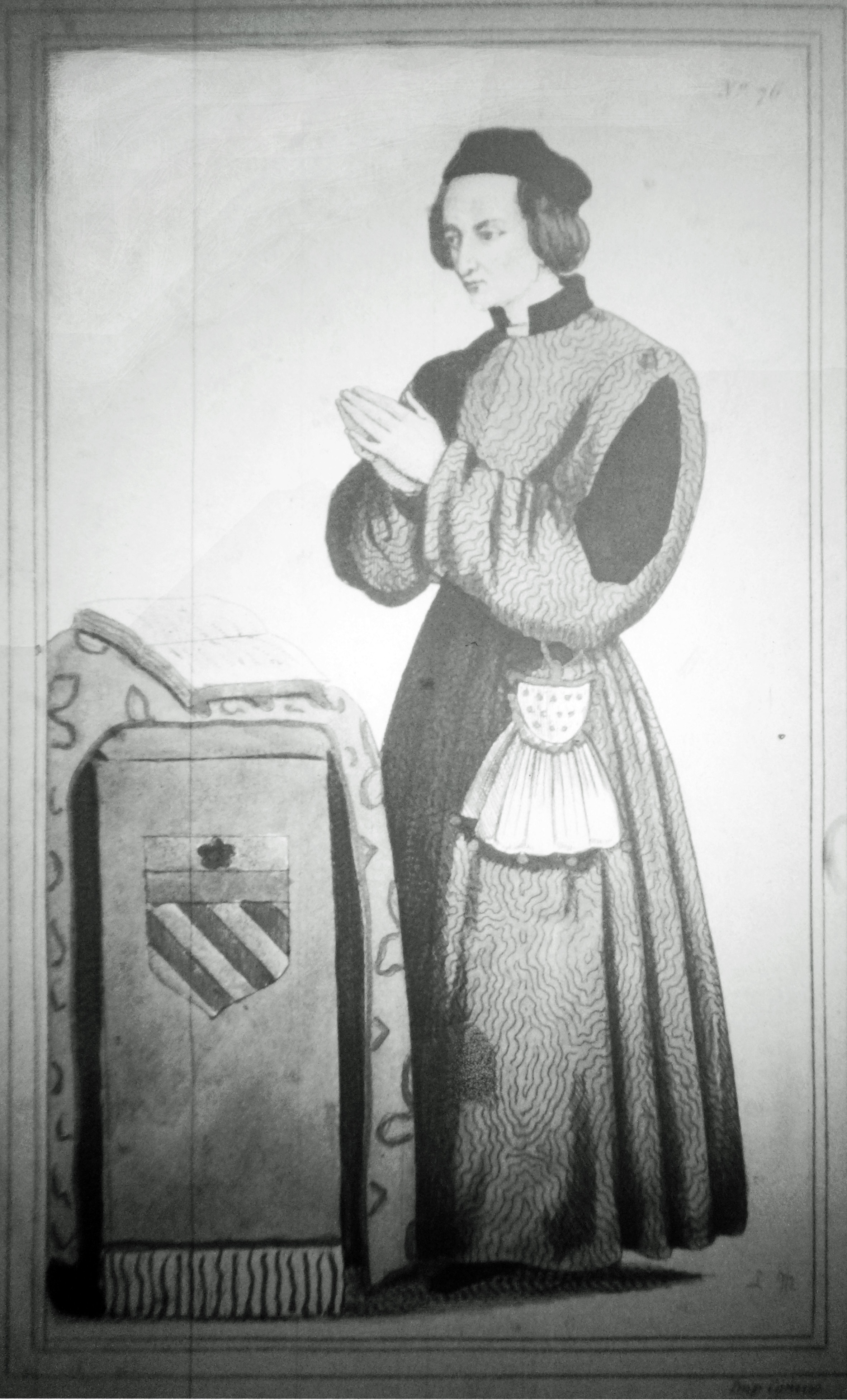 Jean Juvenal des Ursins, collection Gaignière .